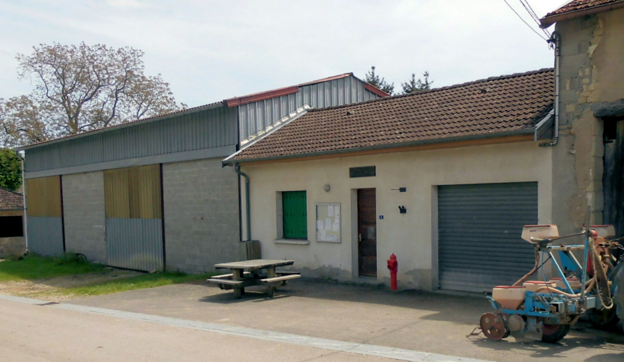 La mairie de Viviers-lès-Offroicourt